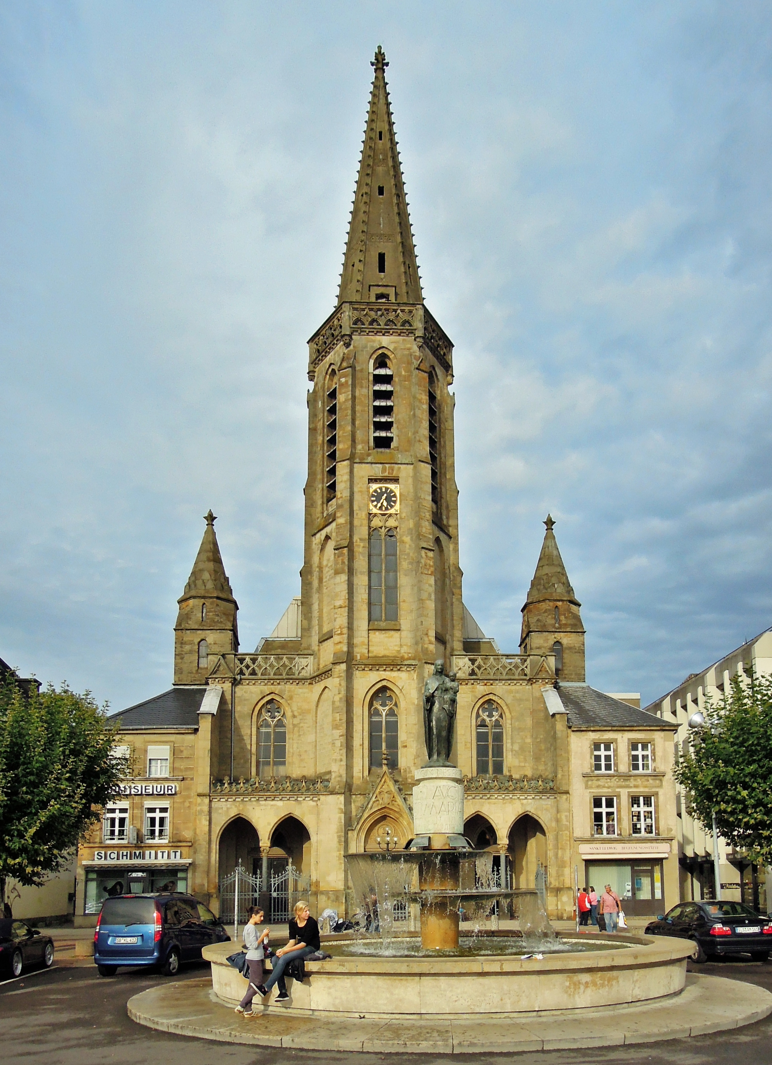 Großer Markt 5, kath. Pfarrkirche St. Ludwig (Einzeldenkmal)